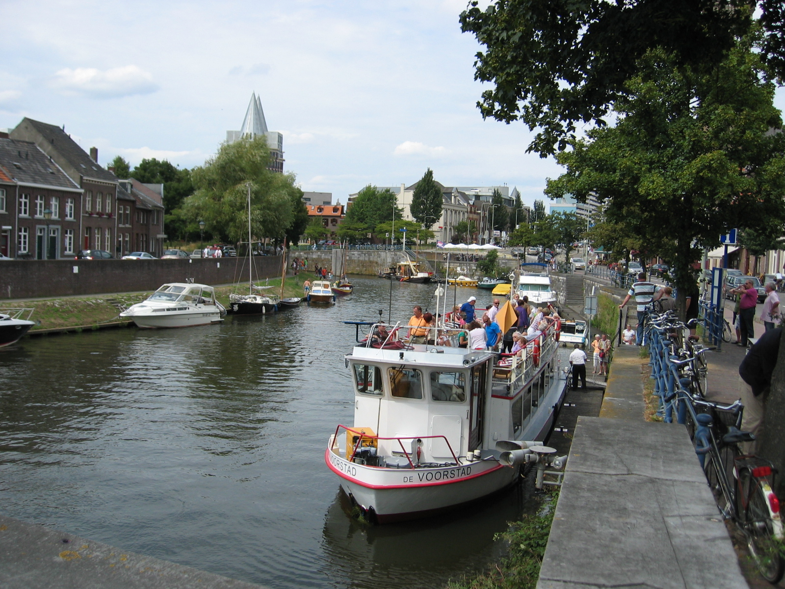 Rurkade in Roermond 2010